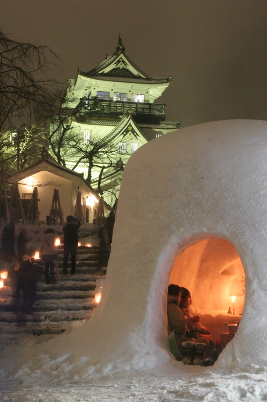 横手公園とかまくら風景